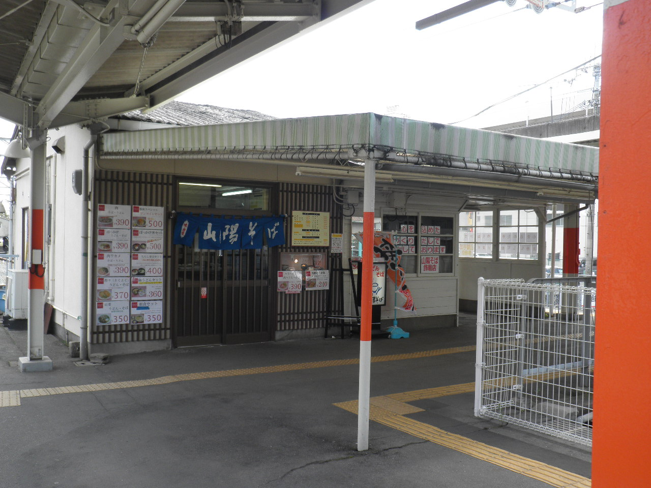 山陽そば飾磨店